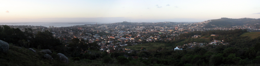 Vista panorâmica de Porto Alegre a partir do Morro do Osso.